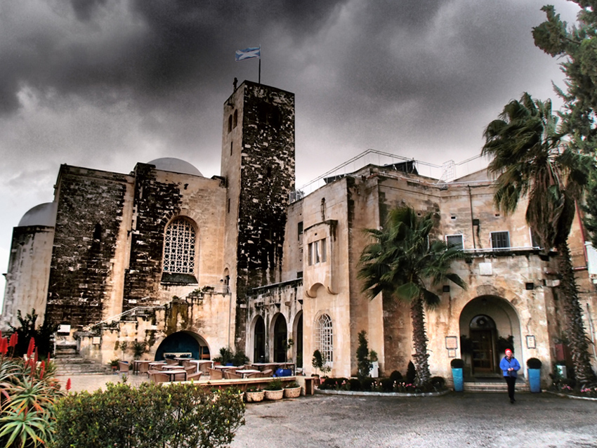 כנסיית סנט אנדרוז נמצאת על מורדות גבעת התנ"ך. הכנסייה שייכת לכנסייה של סקוטלנד, והיא נבנתה כמונומנט הנצחה לחיילים הסקוטים בצבא בריטי, חללי מלחמת העולם הראשונה.